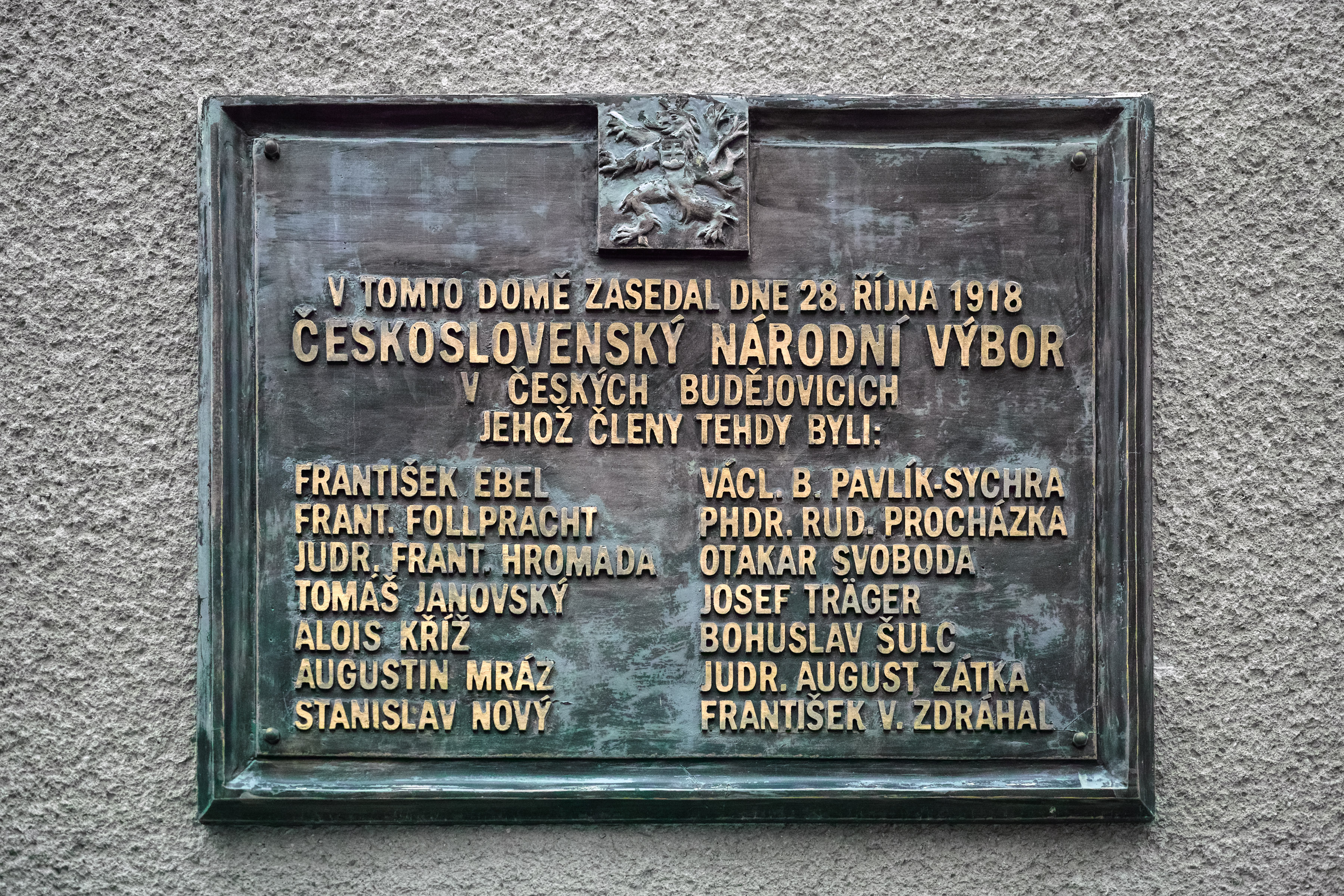 Pamětní deska vzniku Československa, Kněžská 35